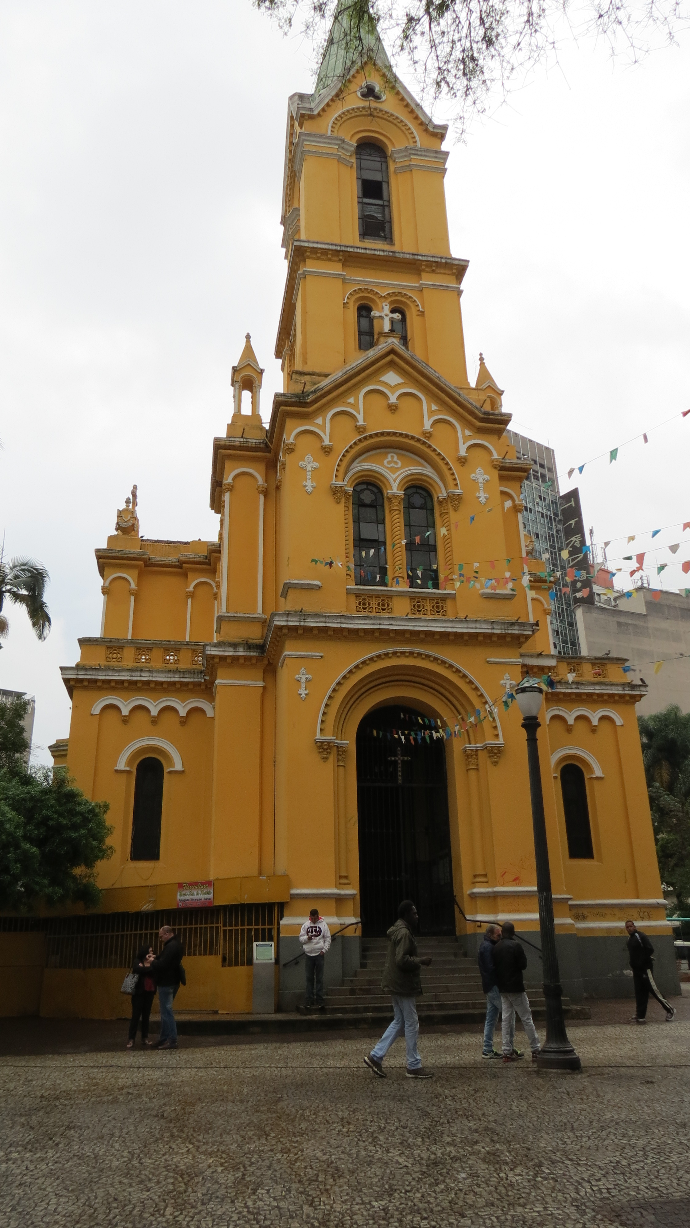 Fachada da Igreja Nossa Senhora do Rosário dos Homens Pretos, em São Paulo (SP), Brasil.